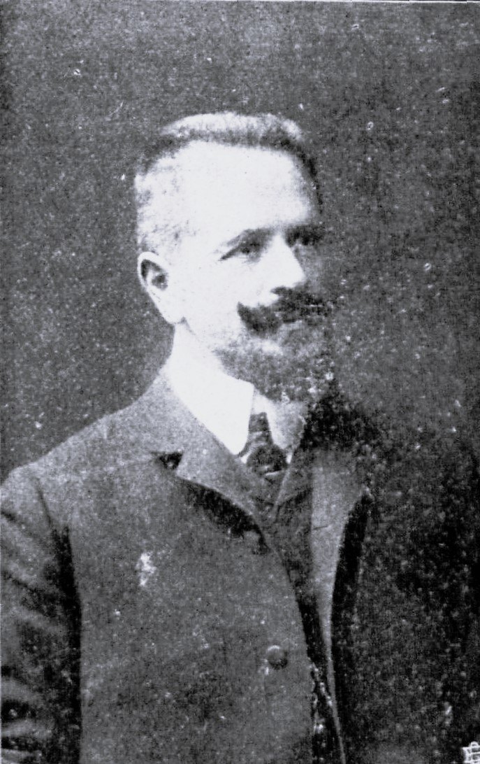 Architekt Max Baudrexel, Leiter des Stadttheaterneubaus